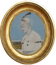 Salabat Jung